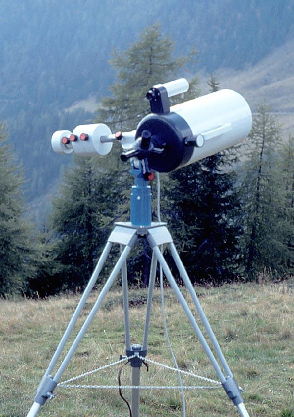 Beschreibung: MENISCAS 180 fotografiert 1990 Fotograf: ArtMechanic